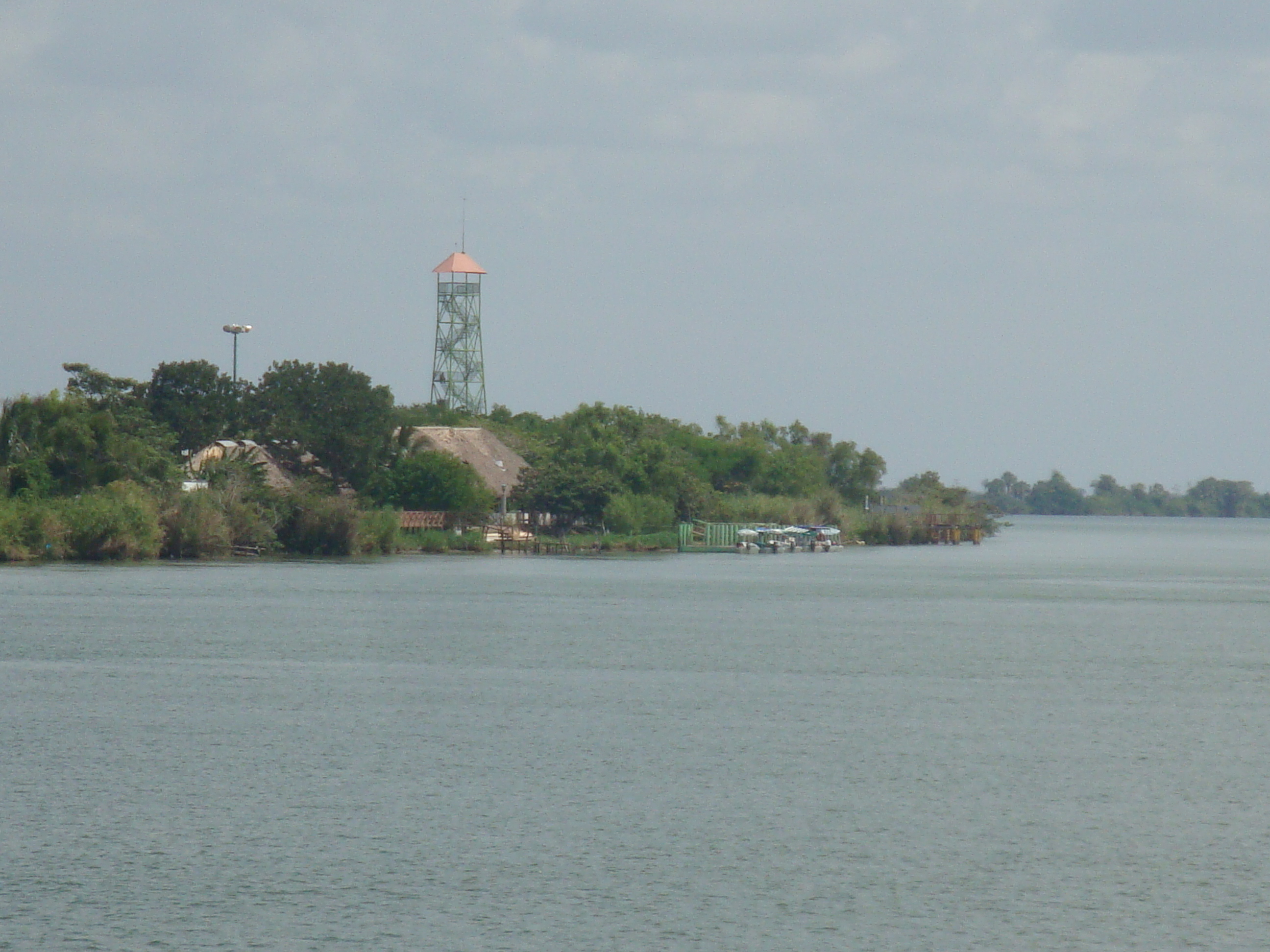 Vista de la Estación "Tres Brazos" con el mirador de 20 m de altura. Reserva de la Biosfera "Pantanos de Centla", municipio de Centla, Tabasco, México.